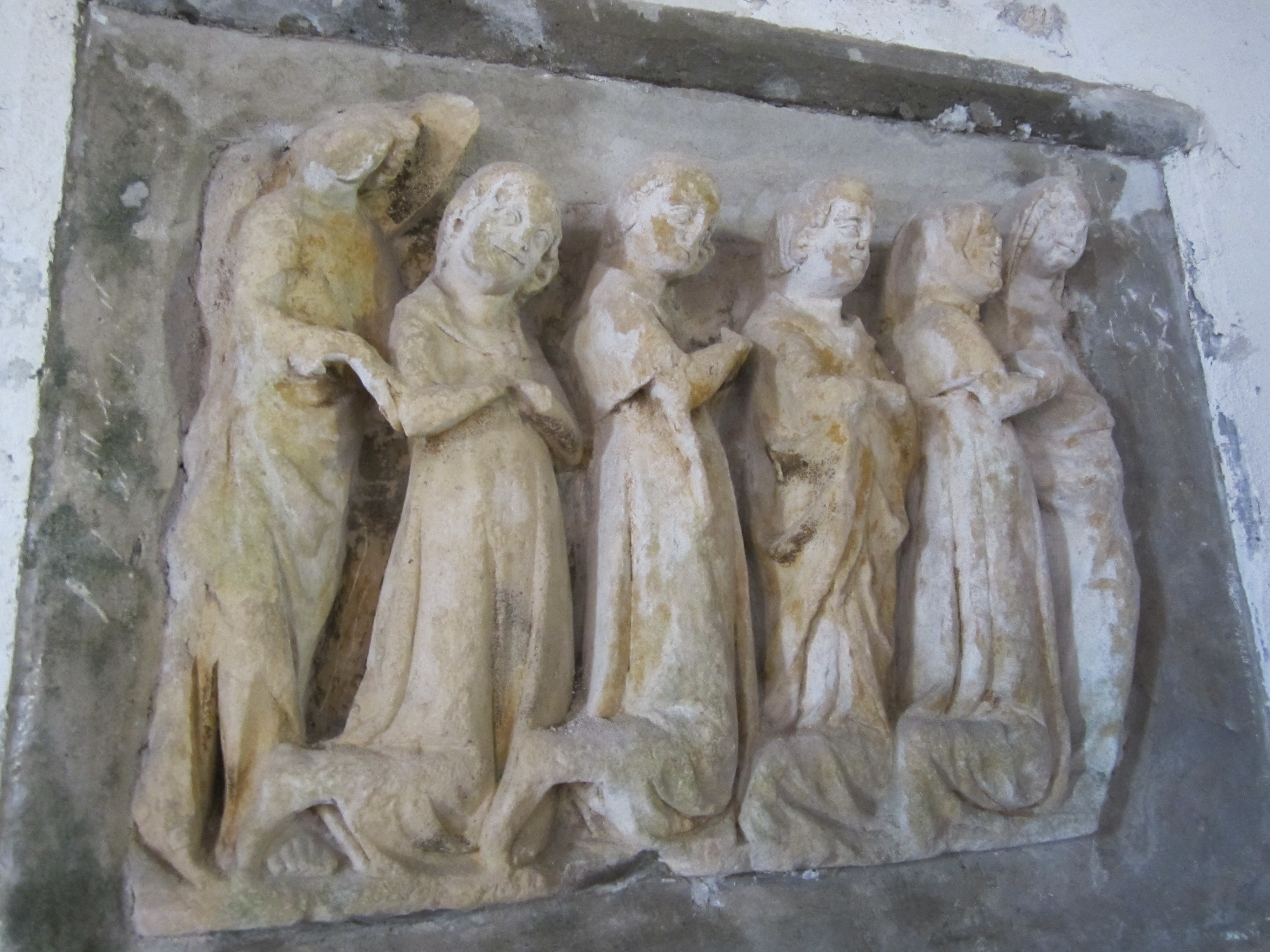 Église Notre-Dame de Pierreville (Manche)